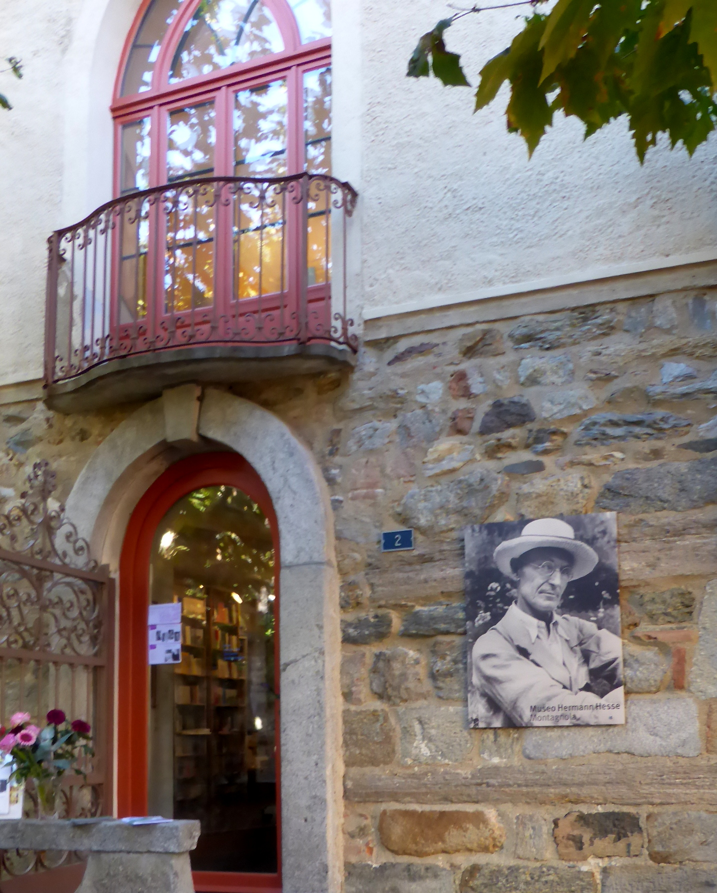 ingresso Museo Hermann Hesse